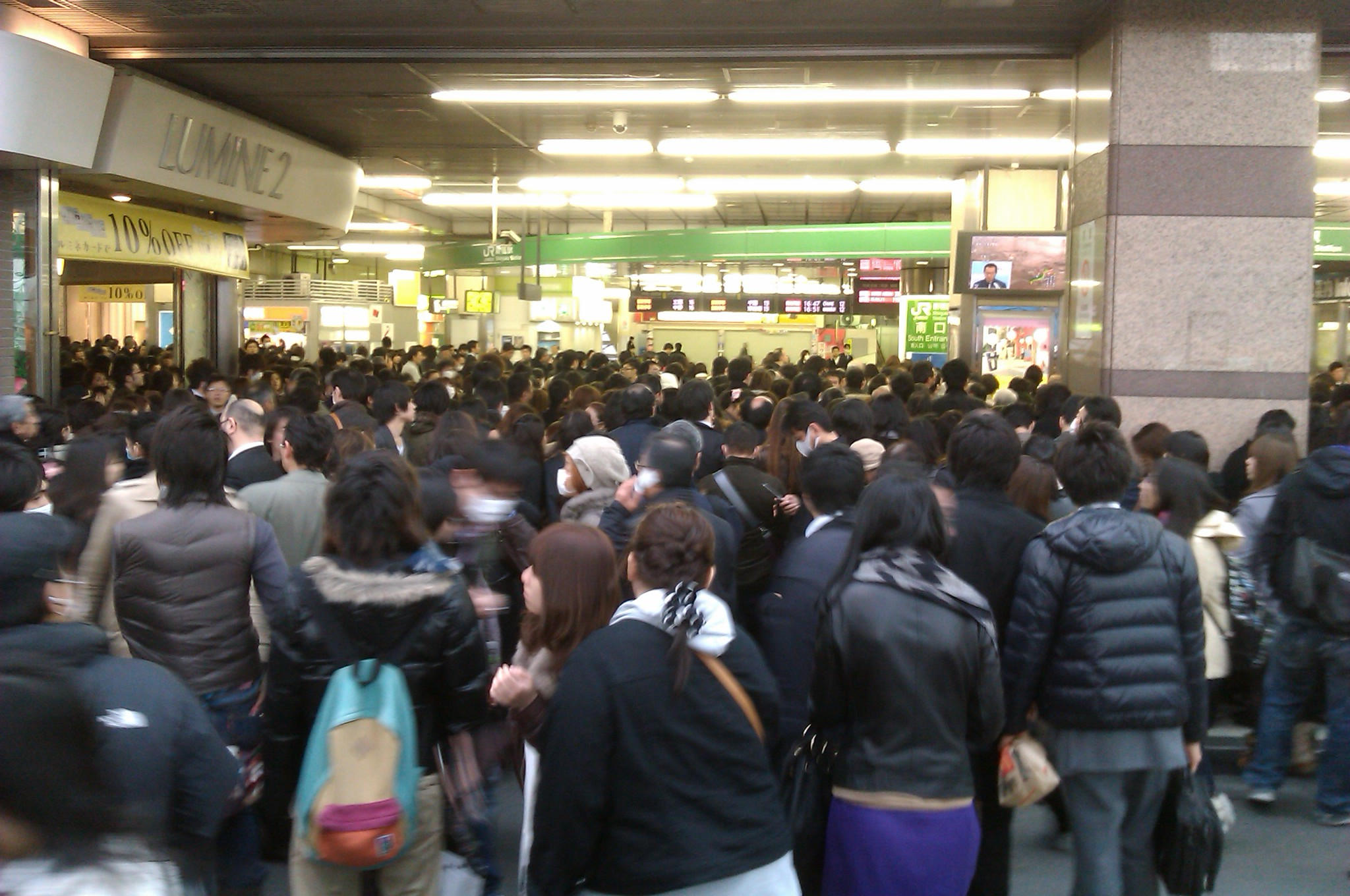 新宿駅に集まる人々